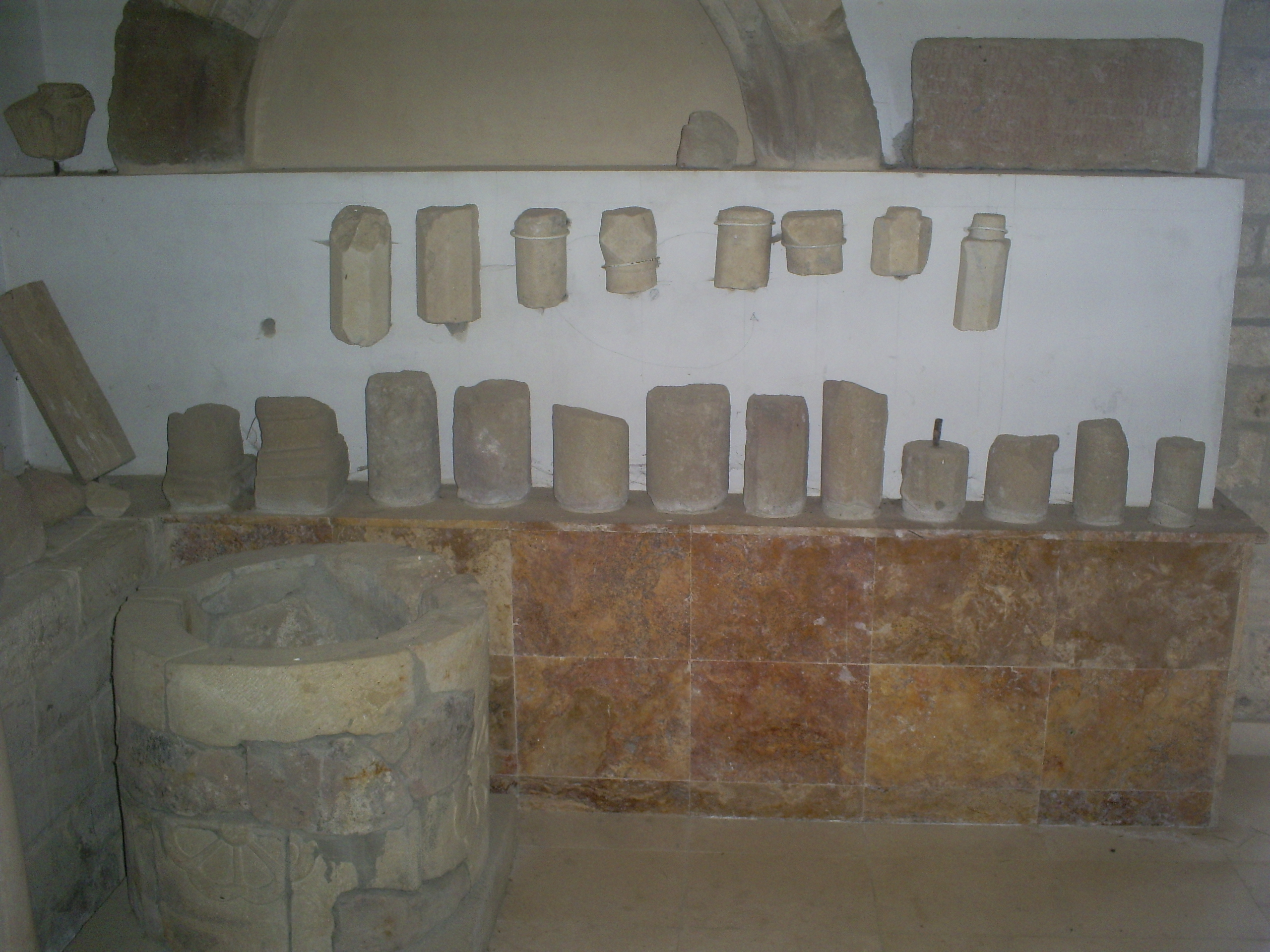 Muzej - manastir Djurdjevi stupovi